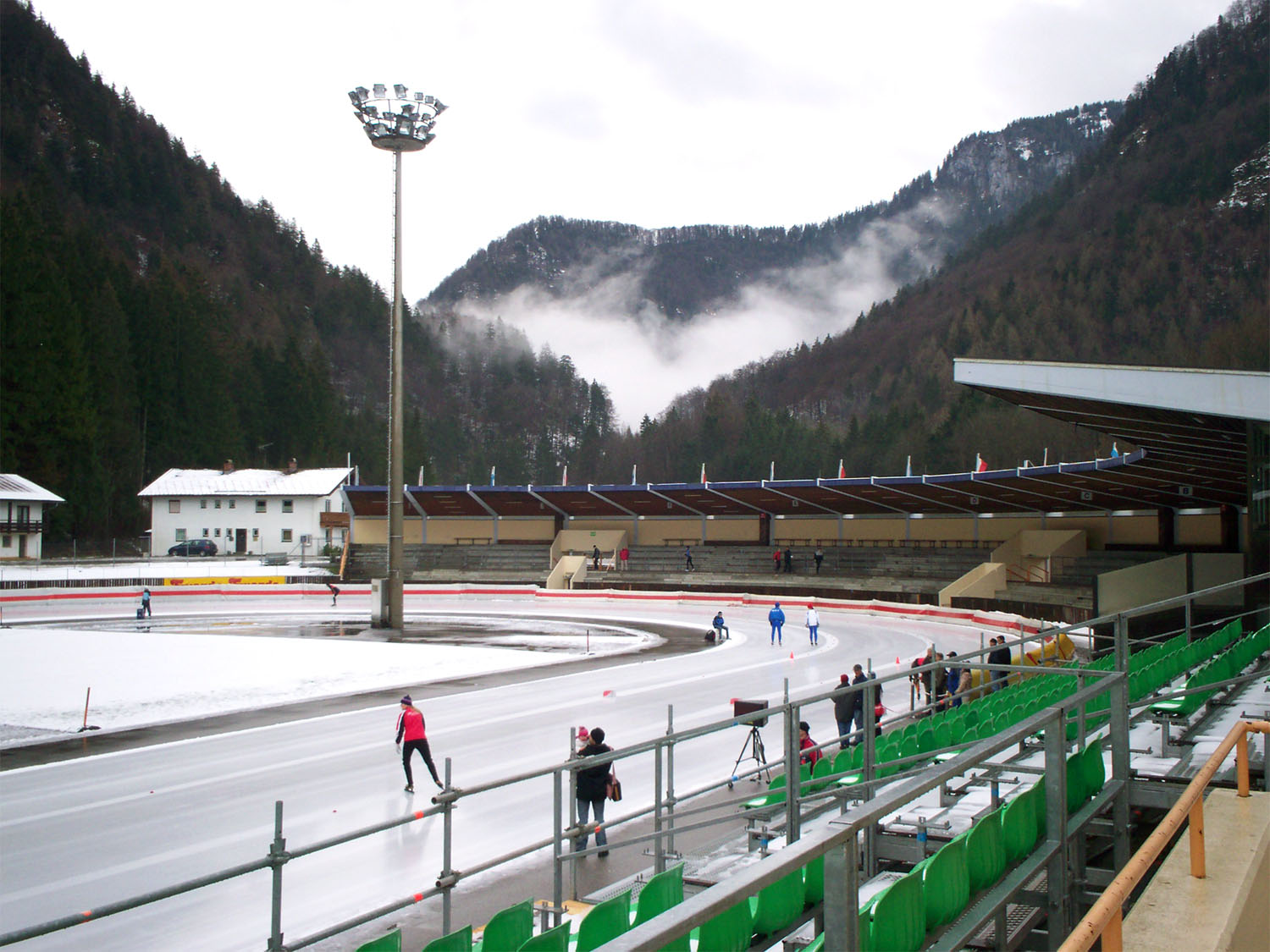 Masters DM 2007 in Inzell (Bayern, Deutschland)